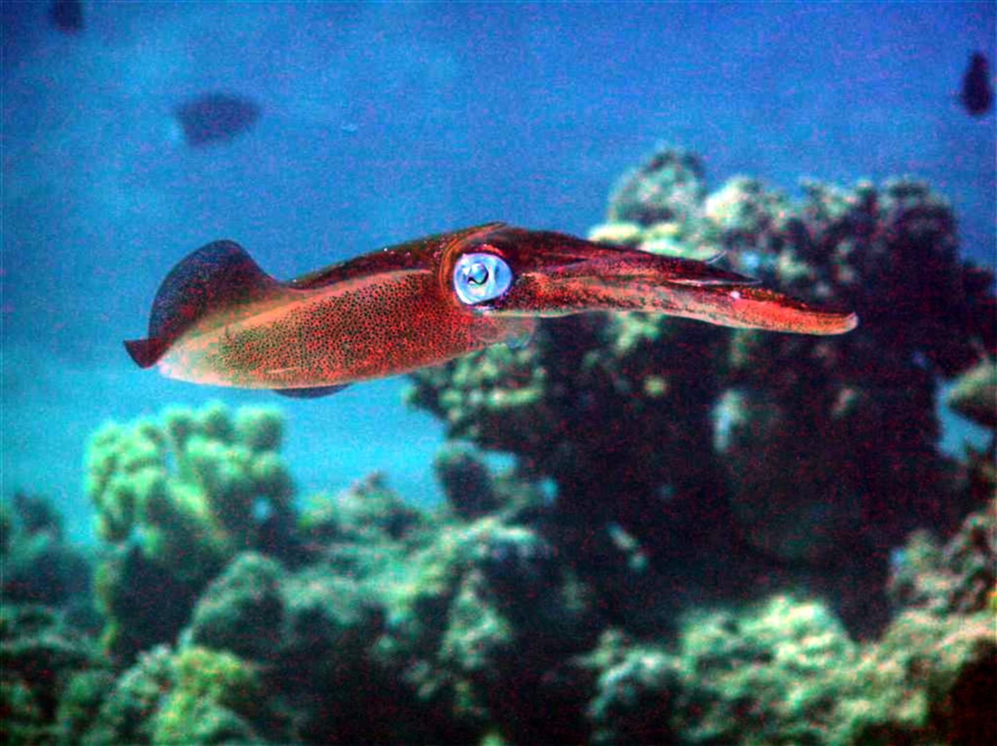 Egypt Summer 2006